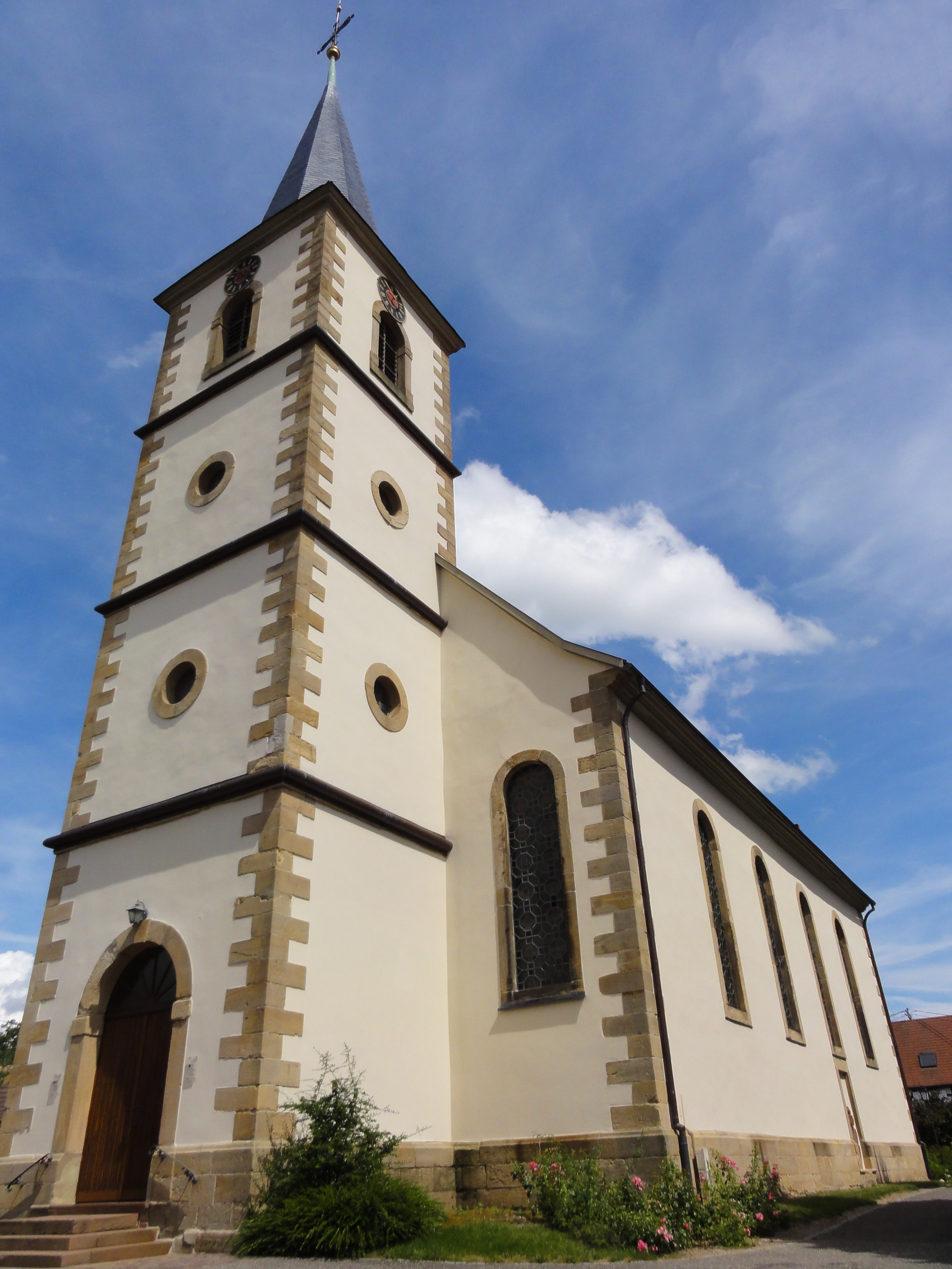 Alsace, Bas-Rhin, Kutzenhausen, Église protestante (XVIIIe)